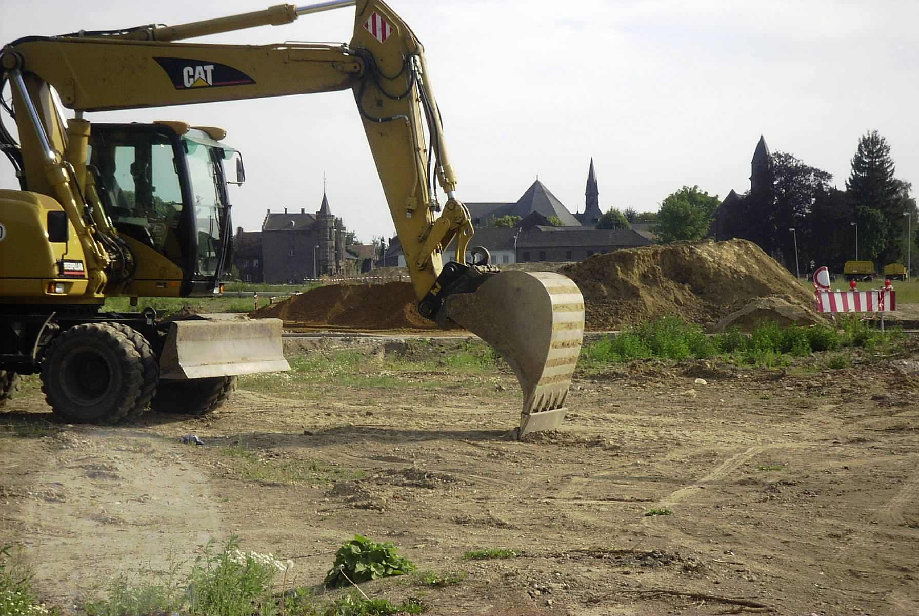 Blockweiser Abriss und Einebnung der Ortschaft Otzenrath im Tagebaugebiet Garzweiler 2006, NRW.